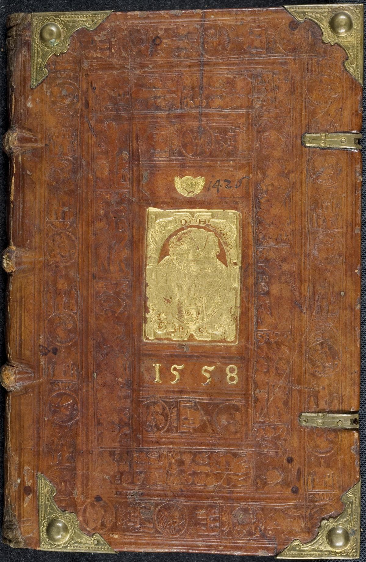 Codex Palatinus germanicus 11, Einband ("Ottheinrich-Einband"), Vorderdeckel: vergoldete Platte mit Bildnis Ottheinrichs, des Pfalzgrafen bei Rhein. Inschrift oben: O. H. (Ottheinrich); Inschrift unten: P. C. (Pfalzgraf, Churfürst).